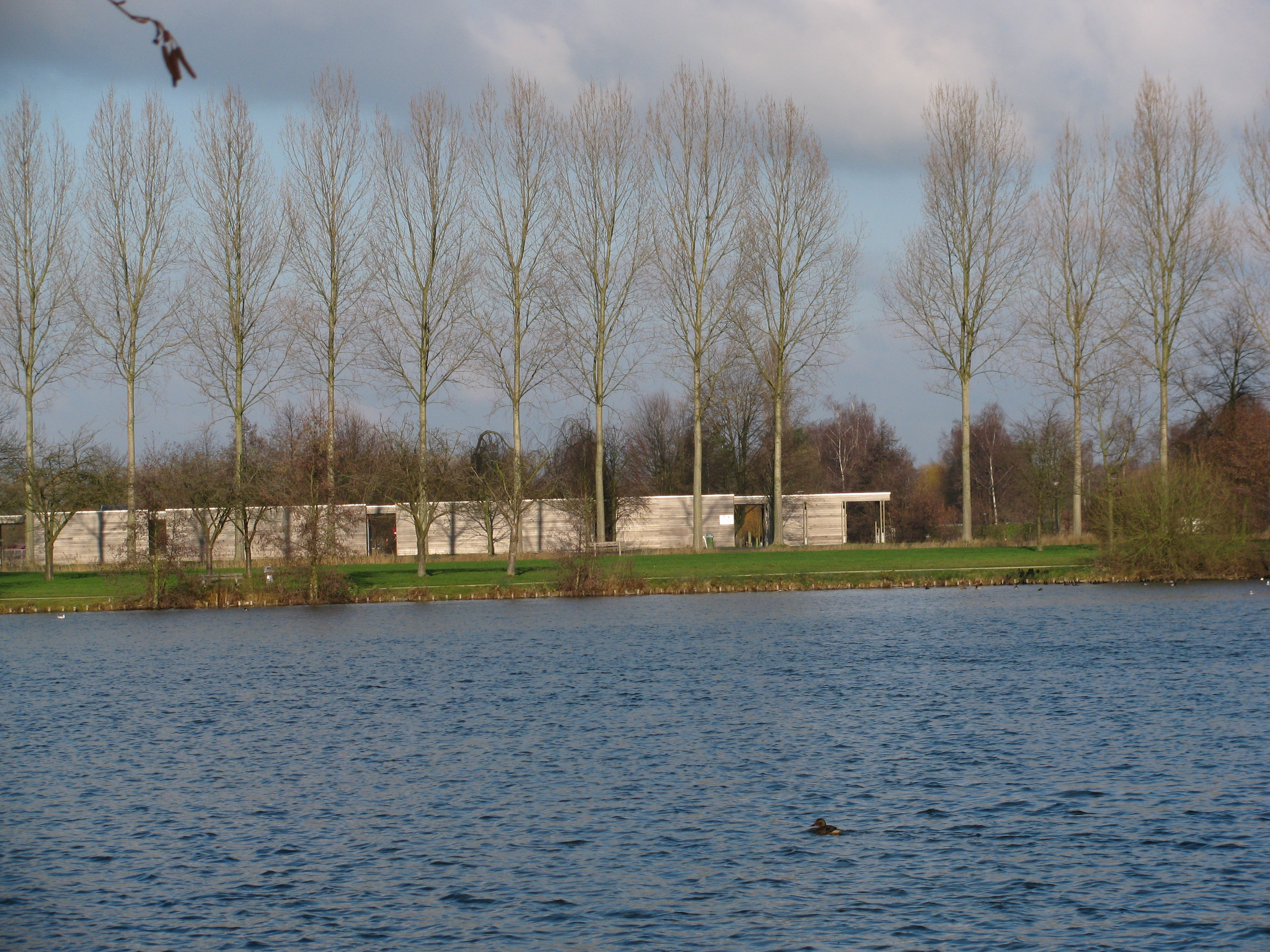 Vijver in Puyenbroeck